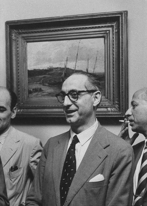 Es una foto del entonces diputado dr. Arturo Frondizi en el comite de la UCR.